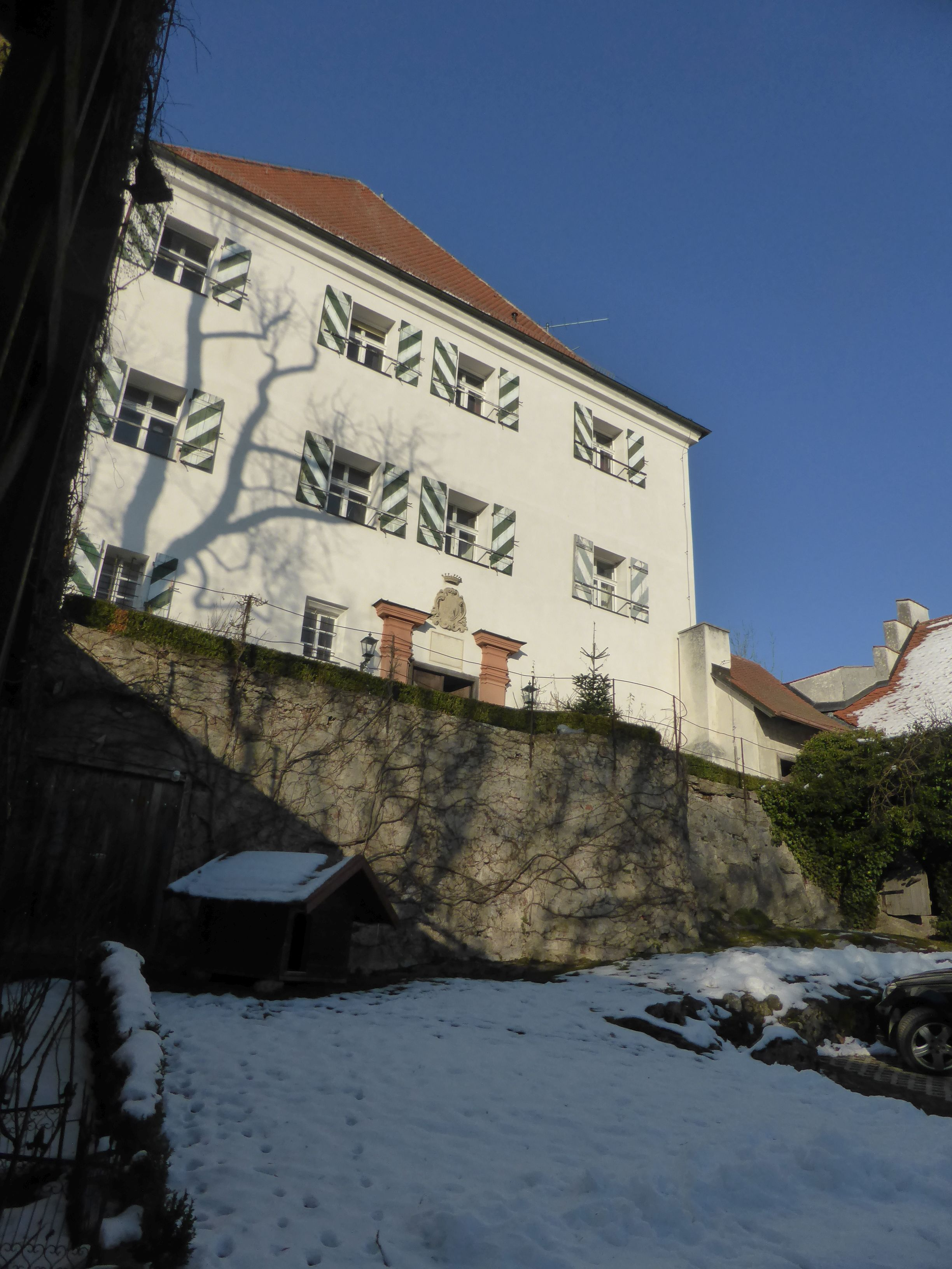 Schloss Stefling in Nittenau